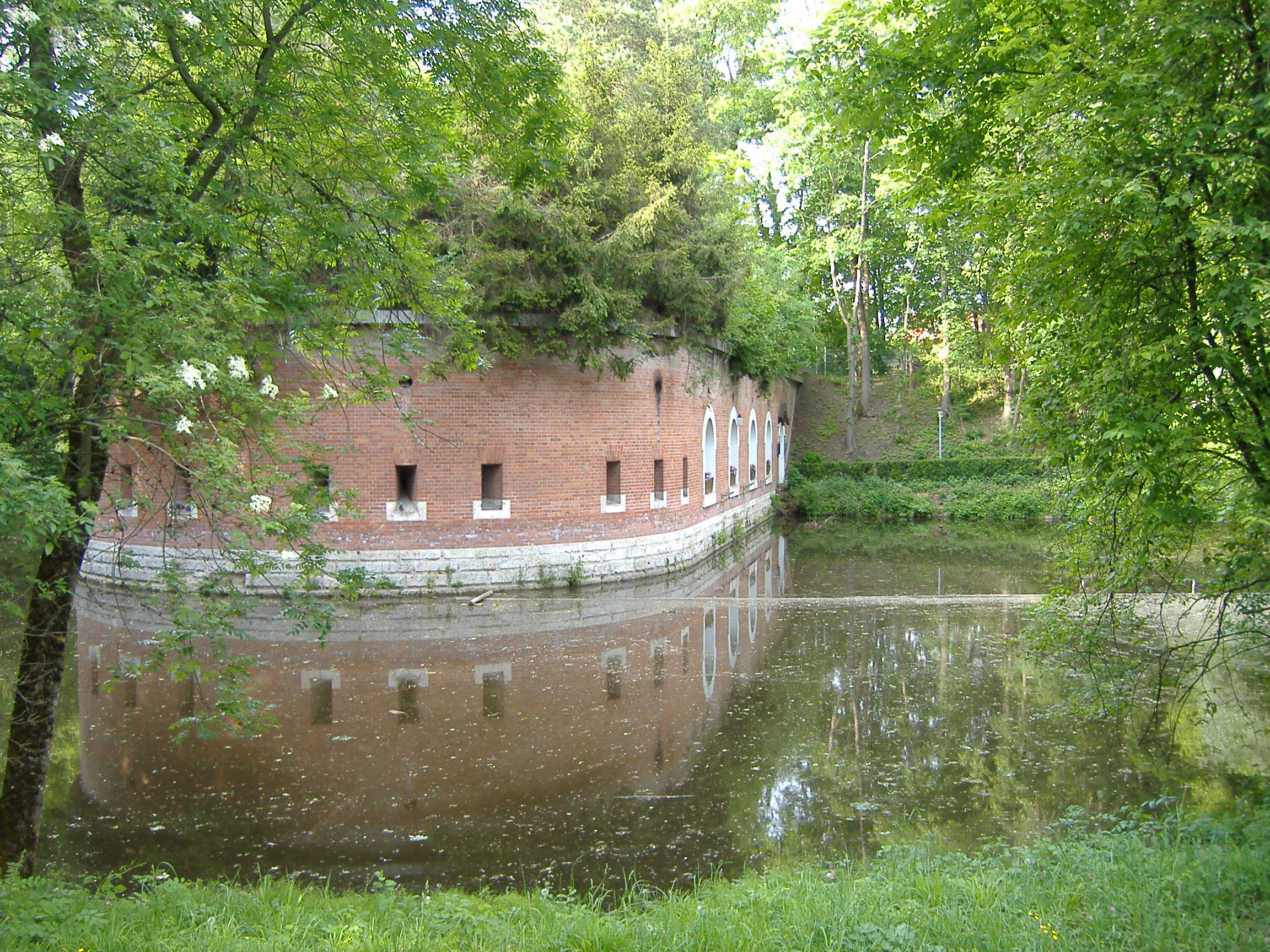 Die Batterie 94, um 1840 erbaut als Teil der klassizistischen Festung